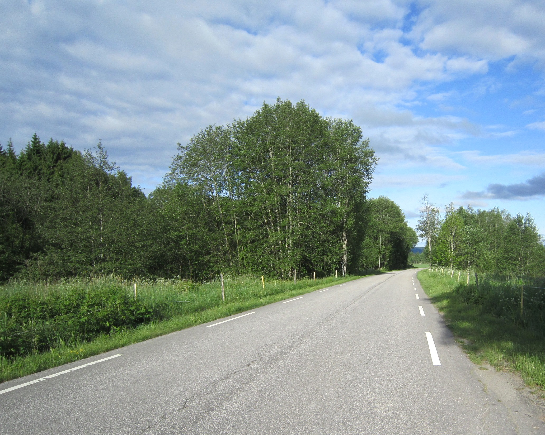 Stasjonsveien i Eidsberg (FV685)